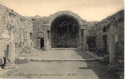 Abside de la basilique Saint-Pierre du Kef.